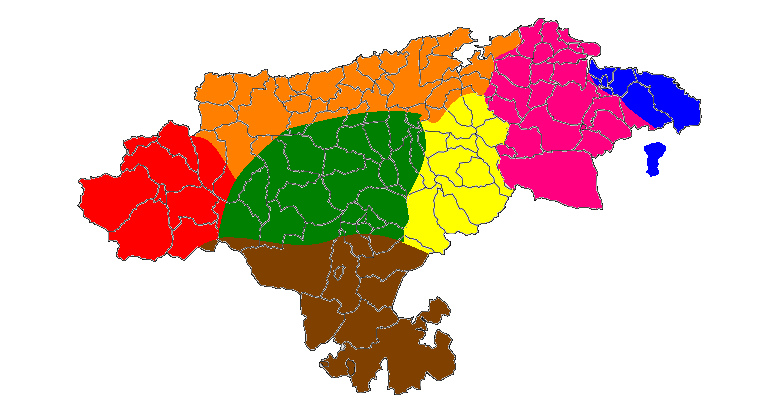 Mapa dialectal de Cantabria, España.